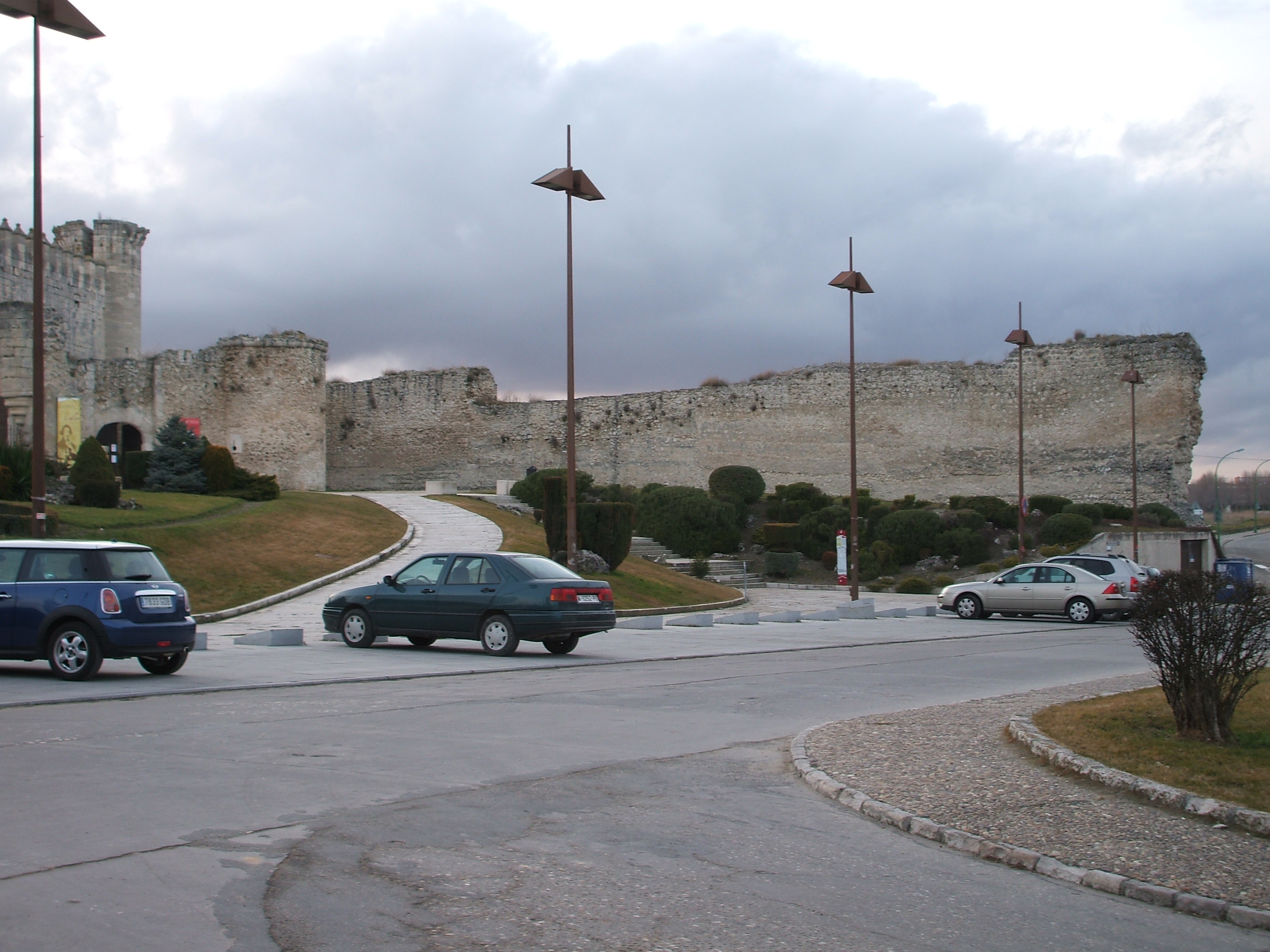 Paño de muralla rebajado por los presos del penal del castillo para reutilizar la piedra en los años 1940 (Cuéllar).